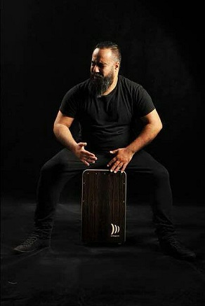 احسان شفیعی- نوازنده موسیقی پاپ